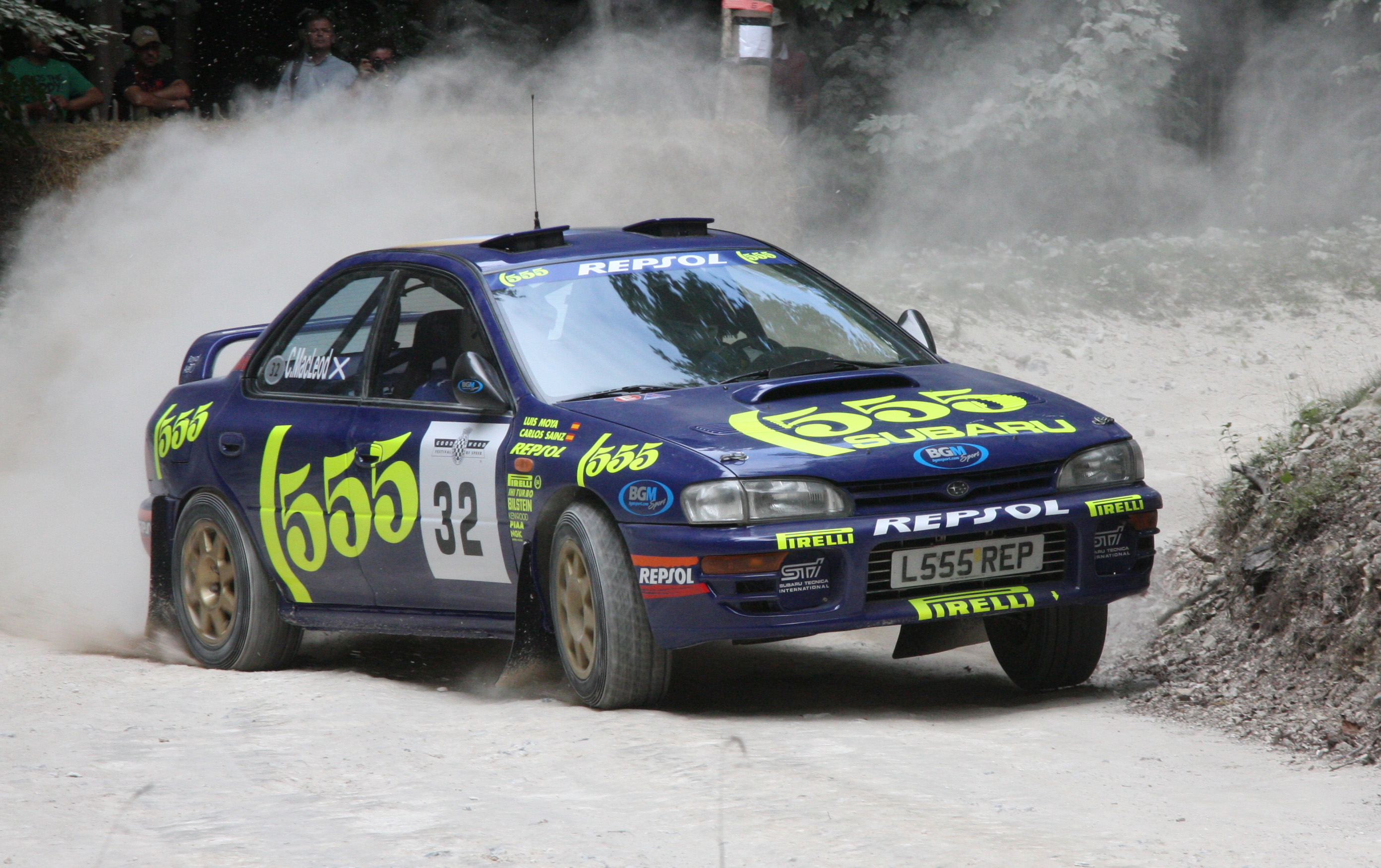 2007 Subaru Impreza WRC